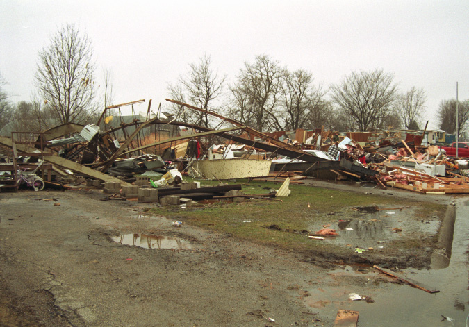 Tornado damage in Le Center, Minnesota